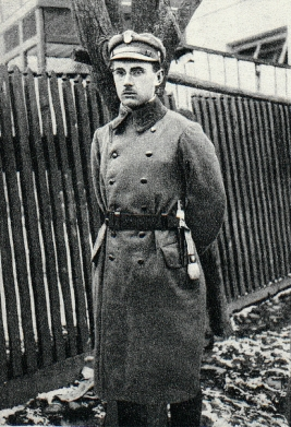 Por. Wacław Styk-Stachiewicz z 5 pułku piechoty Legionów Polskich.